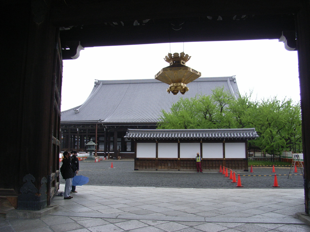 御影堂門より御影堂を望む。目隠しようの壁が興味深い。